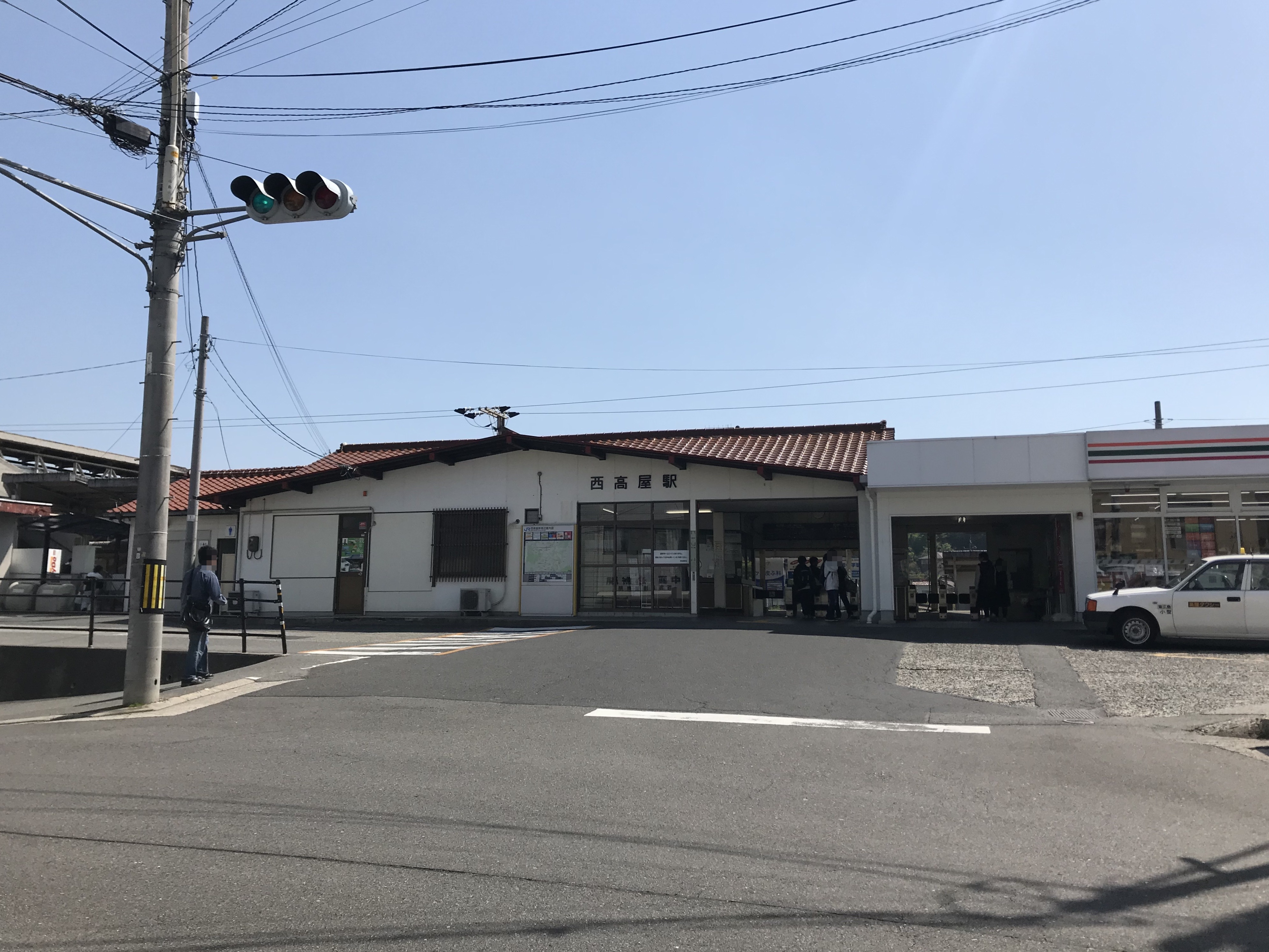 西高屋駅の駅舎